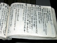 『気吹舎日記』（平田国学の塾、気吹舎の内部資料）